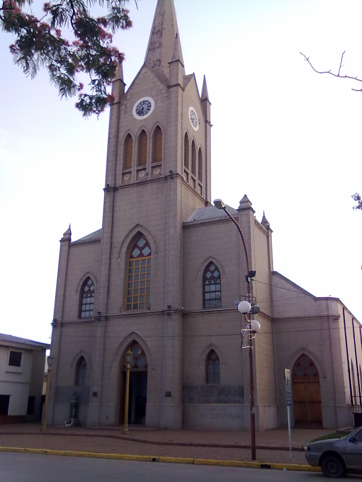 Parroquia San Isidro Labrador. Chacabuco, Provincia de Bs As.